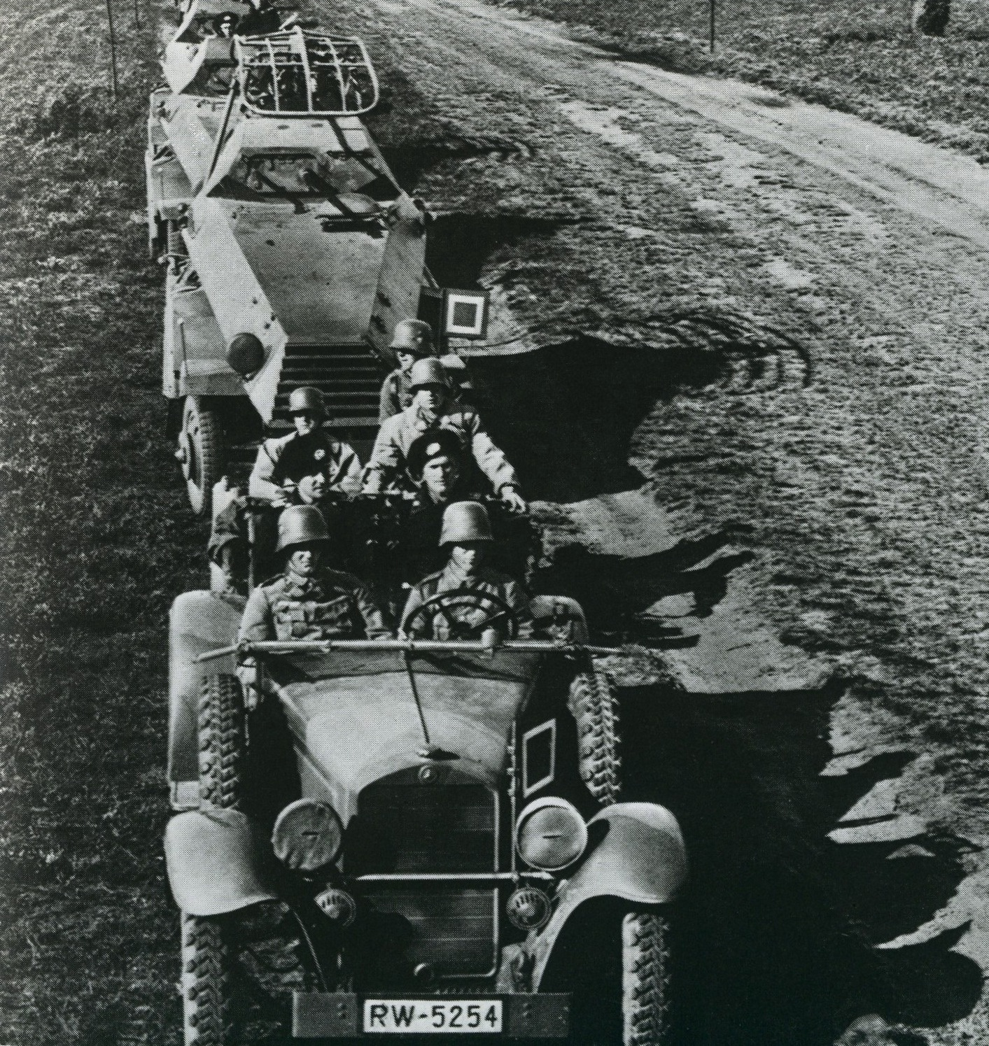 III Reich, 1935. First auto - Mercedes(?), second - SdKfz 231.